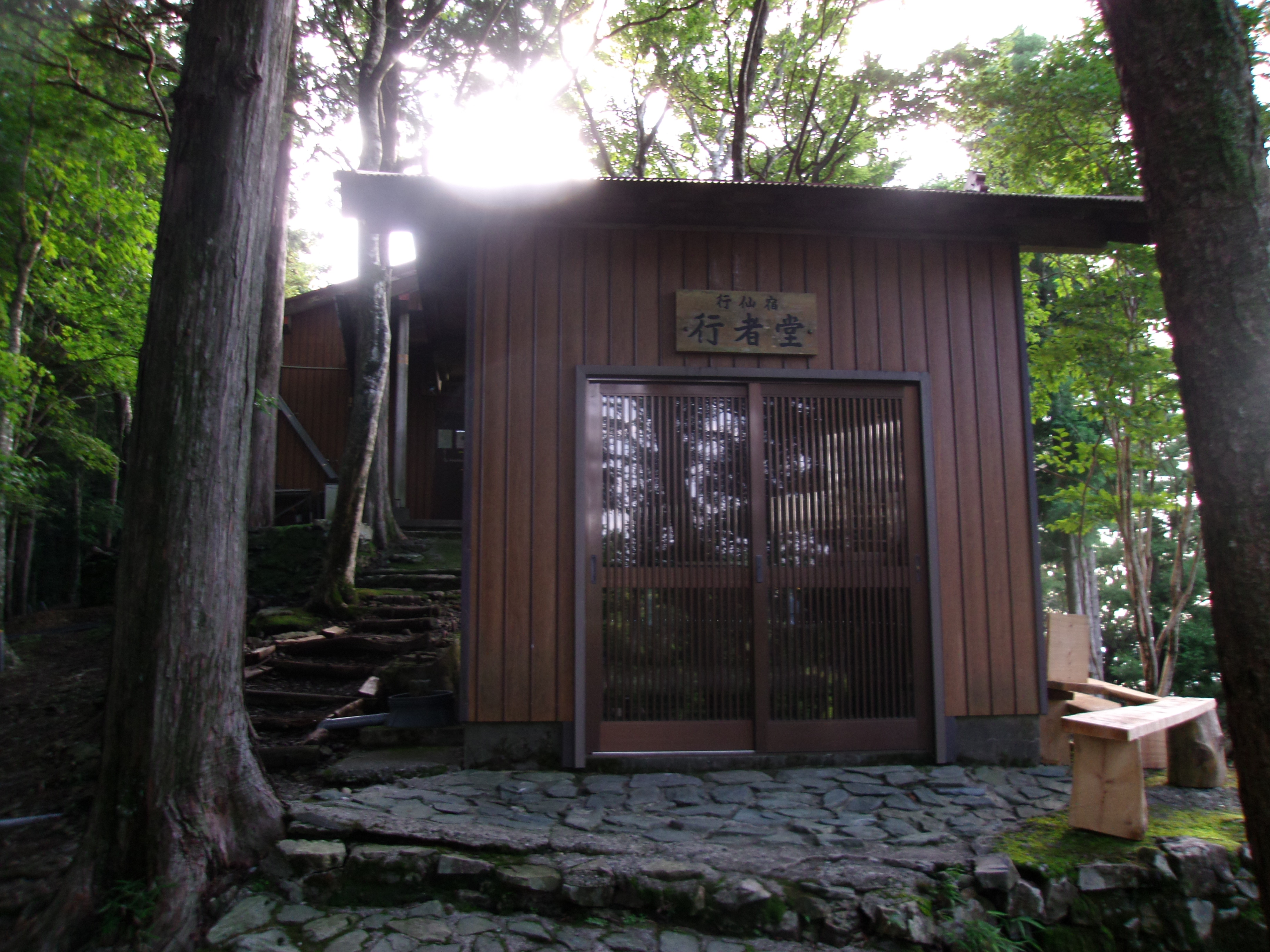 大峯奥駈道第19靡「行仙岳」麓にある行者堂